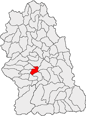 Categorie:Hărţi ale judeţului Hunedoara